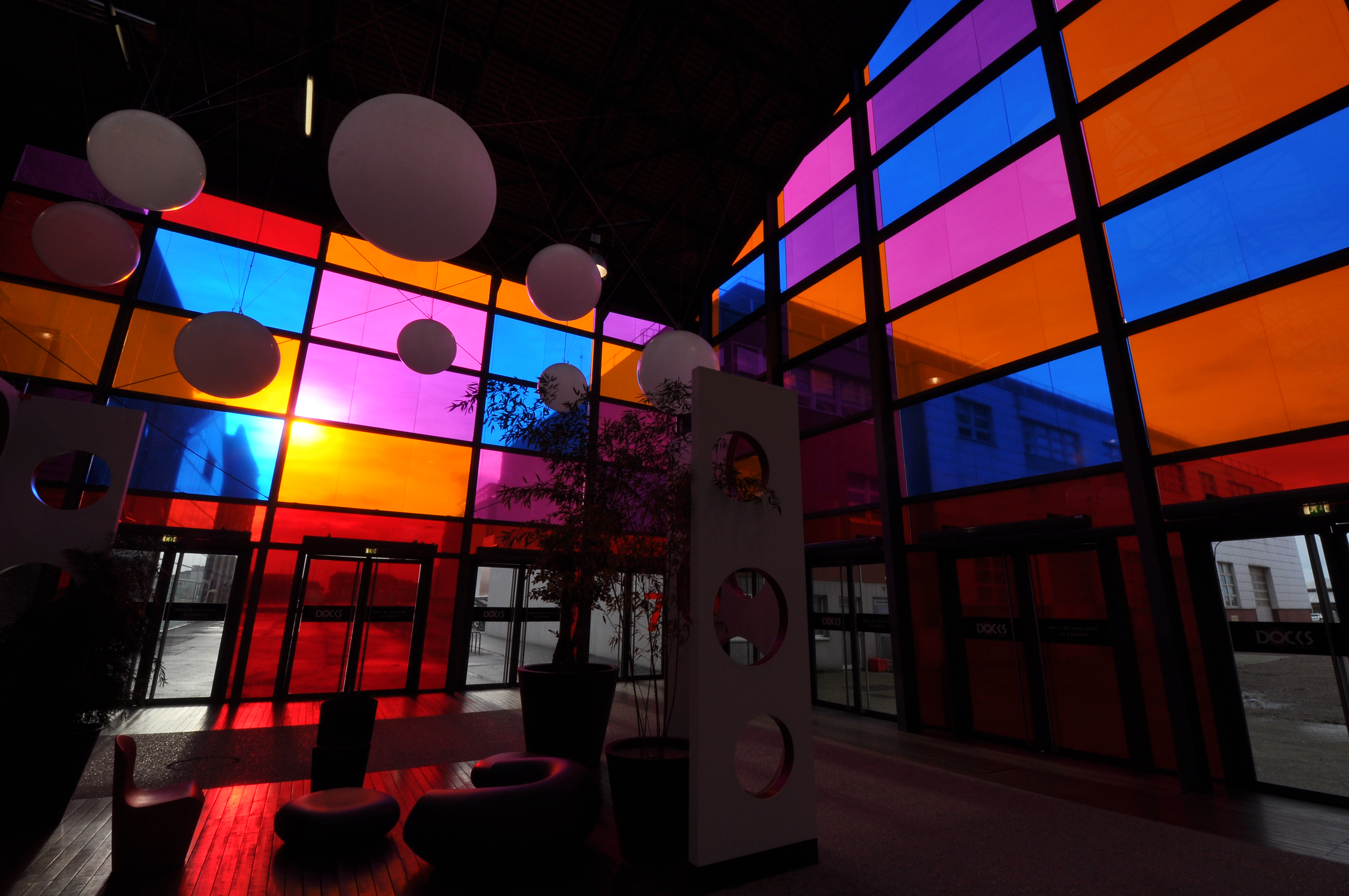 Das Einkauszentrum "Les Docks Vauban" in Le Havre von innen aufgenommen.